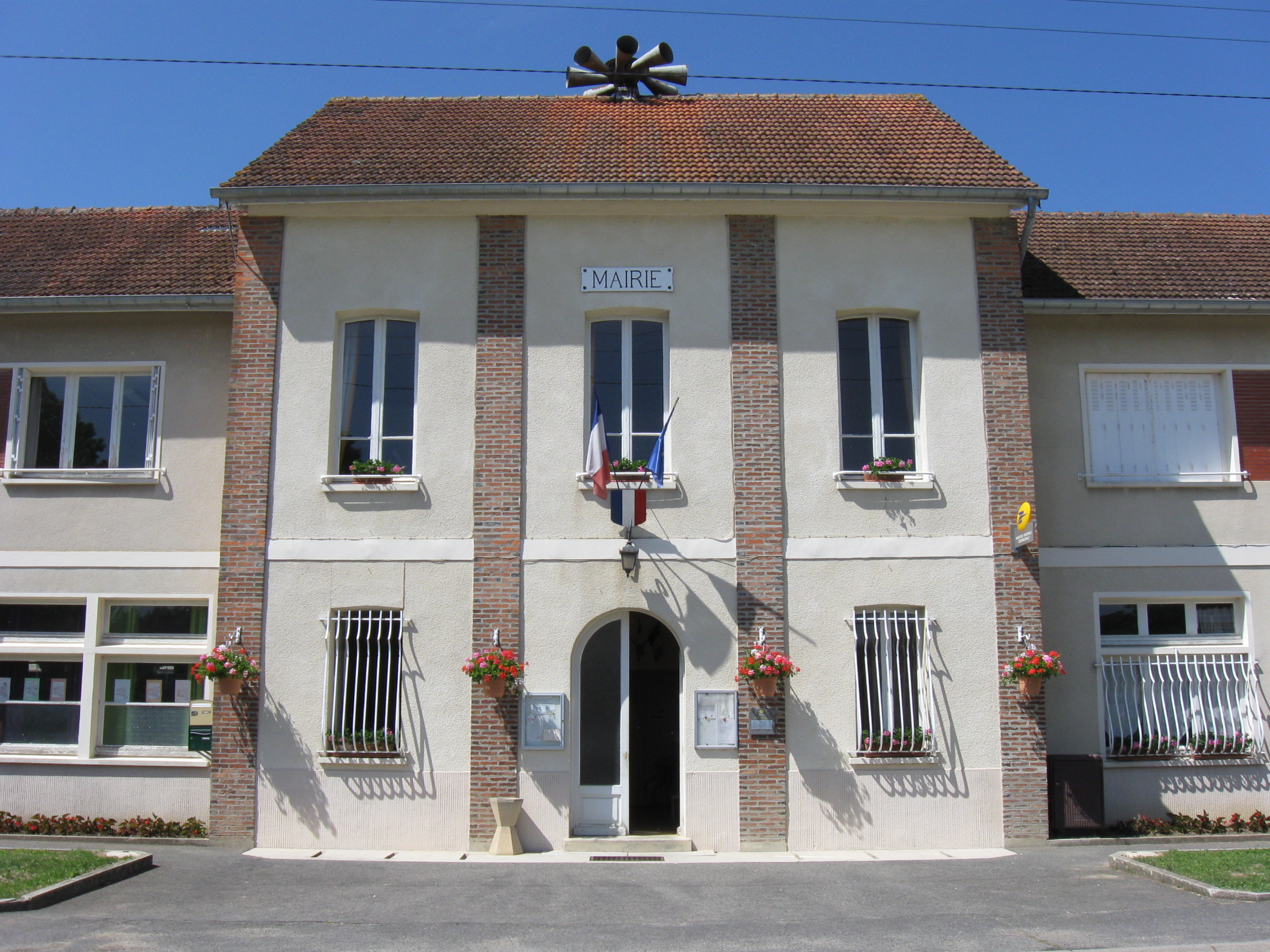 Mairie des Ormes-sur-Voulzie. (Seine-et-Marne, région Île-de-France).